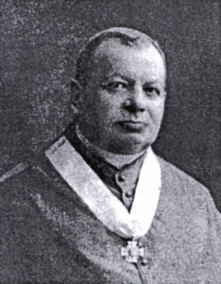 Jan Tenora (1863 - 1936), Český římskokatolický kněz a církevní historik .